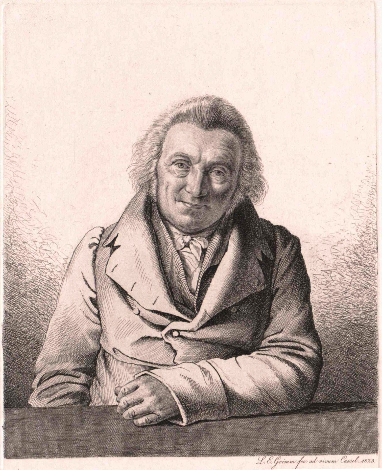 Johann Gottfried Eichhorn (1790–1863)